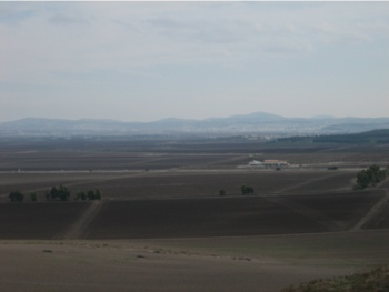 Jizreel Valley as seen from Meggido, Israel. / Pogled na dolinu Jizreel i sjeverno Efrajimsko gorje iz Megida.